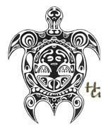 dessin de tortue style tatouage